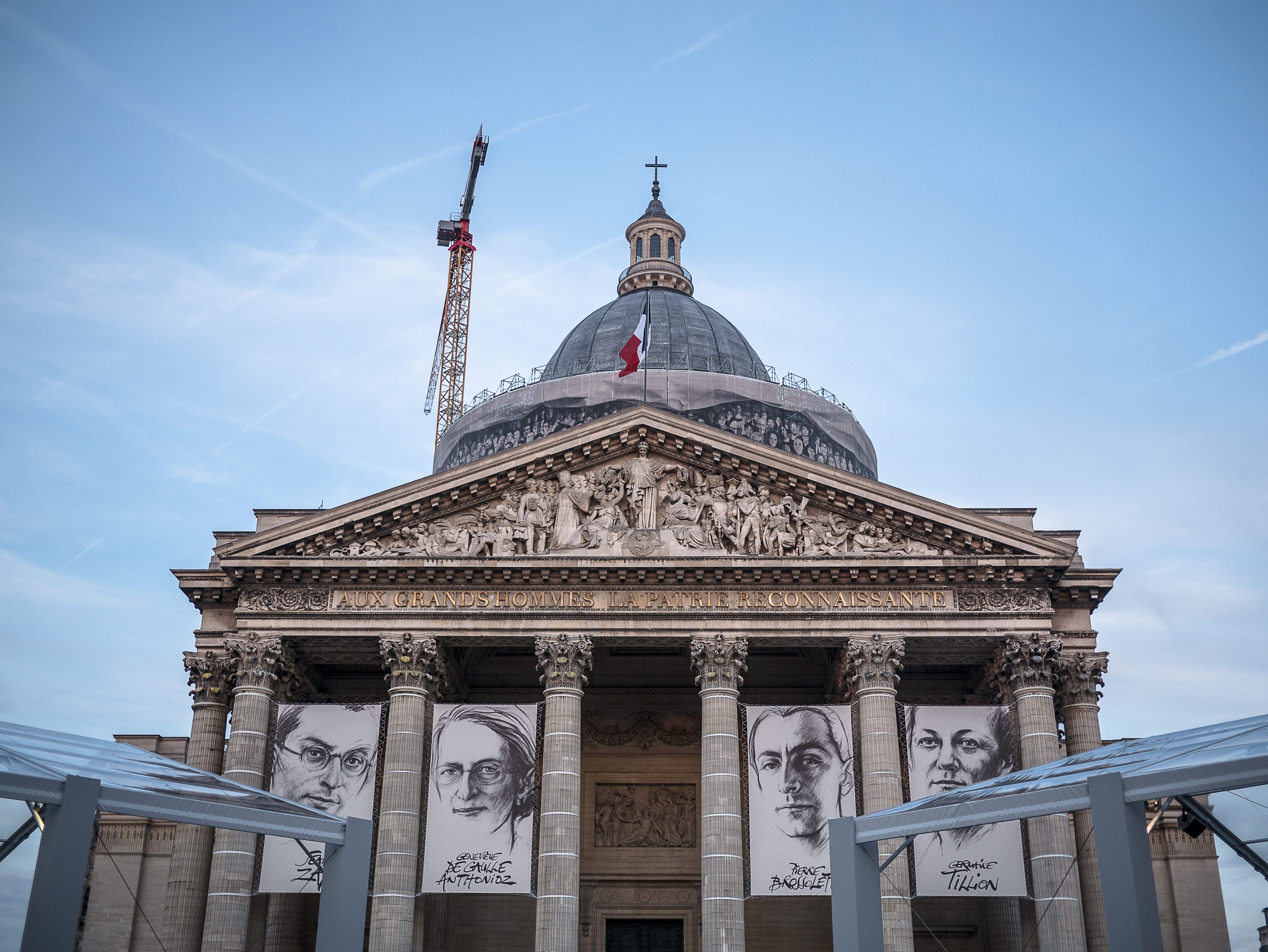 Germaine Tillion, Geneviève de Gaulle-Anthonioz, Pierre Brossolette et Jean Zay rentrent au Panthéon - Paris - 27 mai 2015.